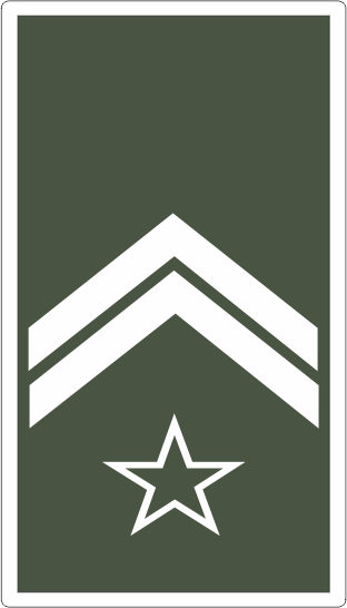 Insígnia Plastificada de Aluno do Curso de Formação de Sargentos de Carreira